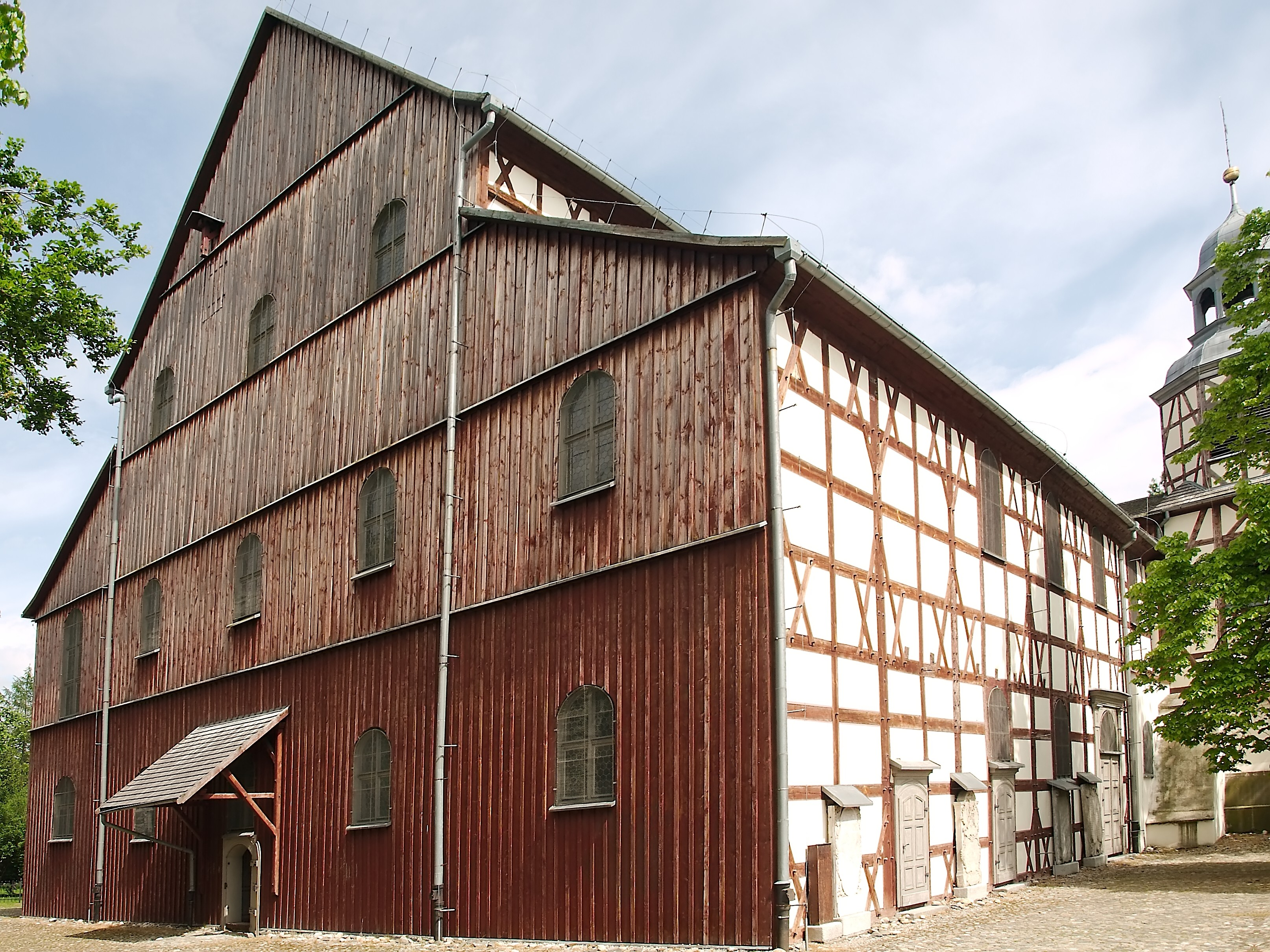 Kościół Pokoju. Siedemnastowieczny drewniany kościół ewangelicki w Jaworze.